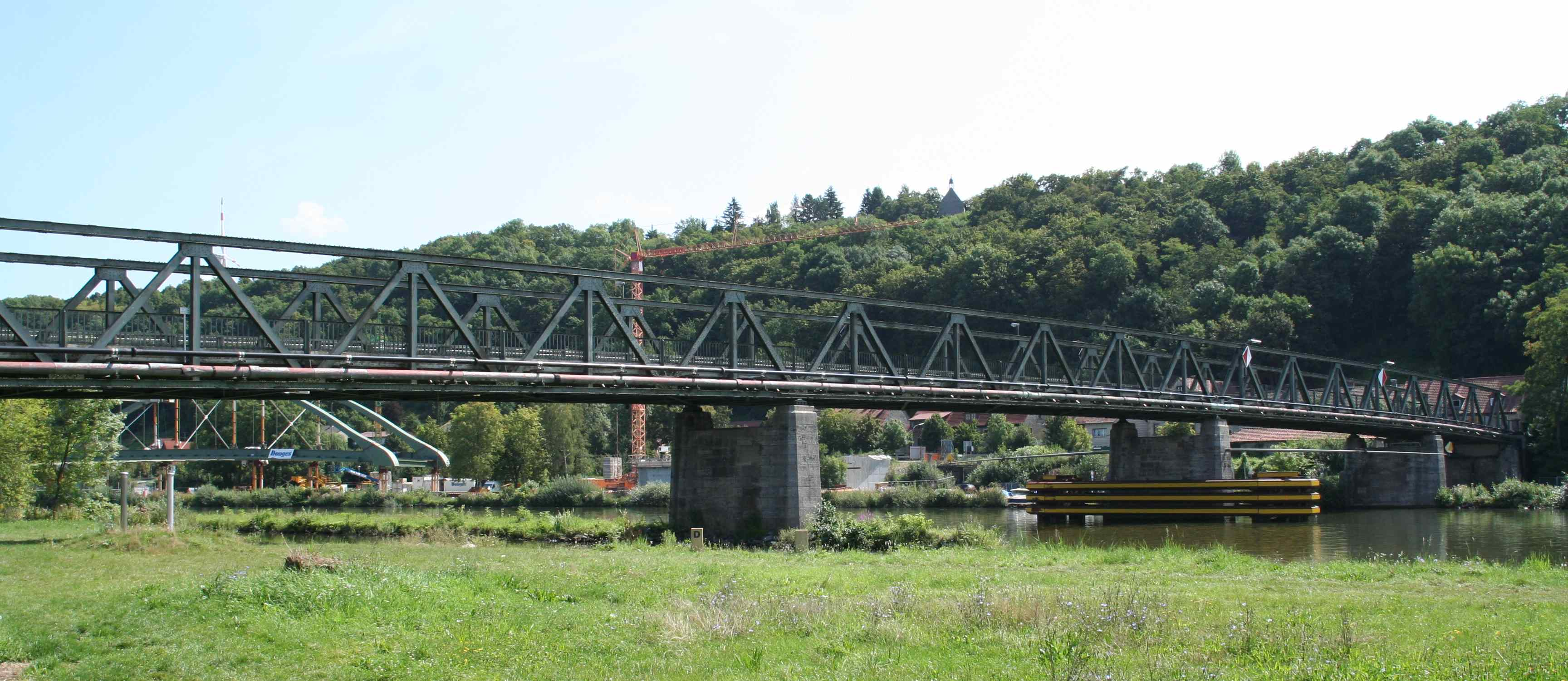 Mainbrücke Segnitz, Landkreis Kitzingen, Unterfranken